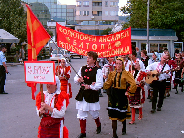 ФА Битољ. Дефиле 2006.